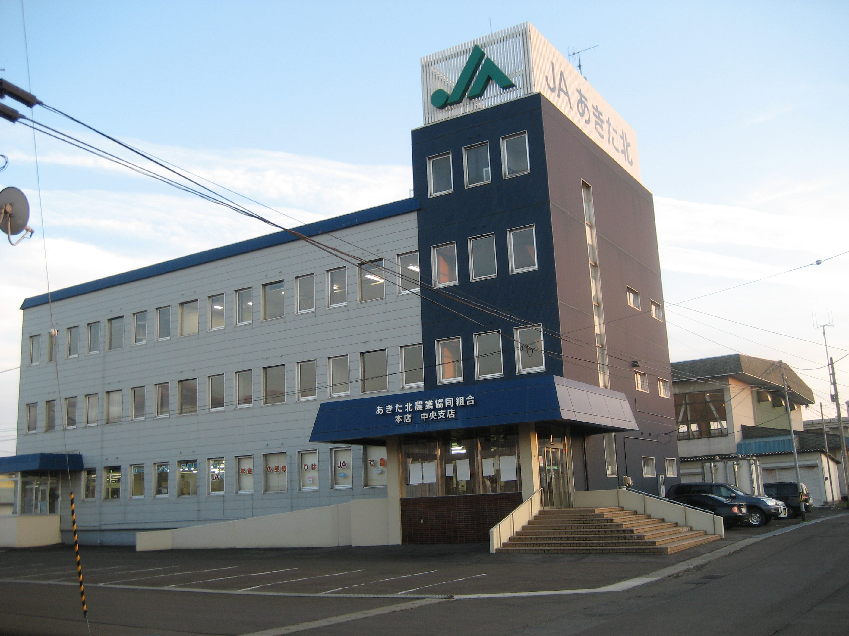 あきた北農業協同組合本店・中央支店